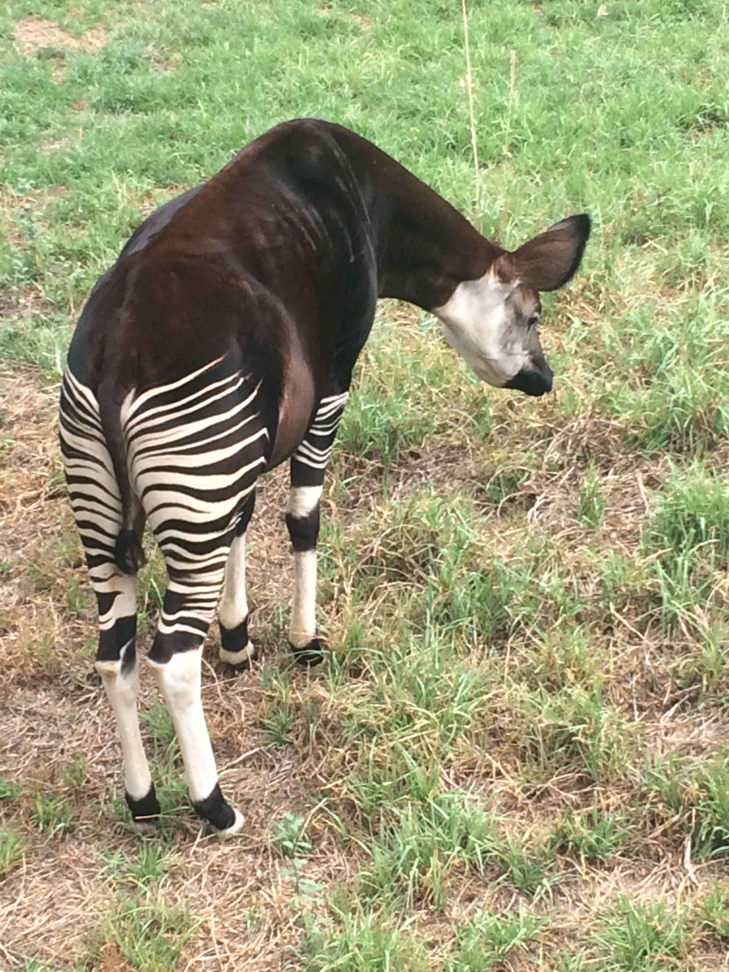 'n Foto van 'n Okapi in die Pretoria dieretuin